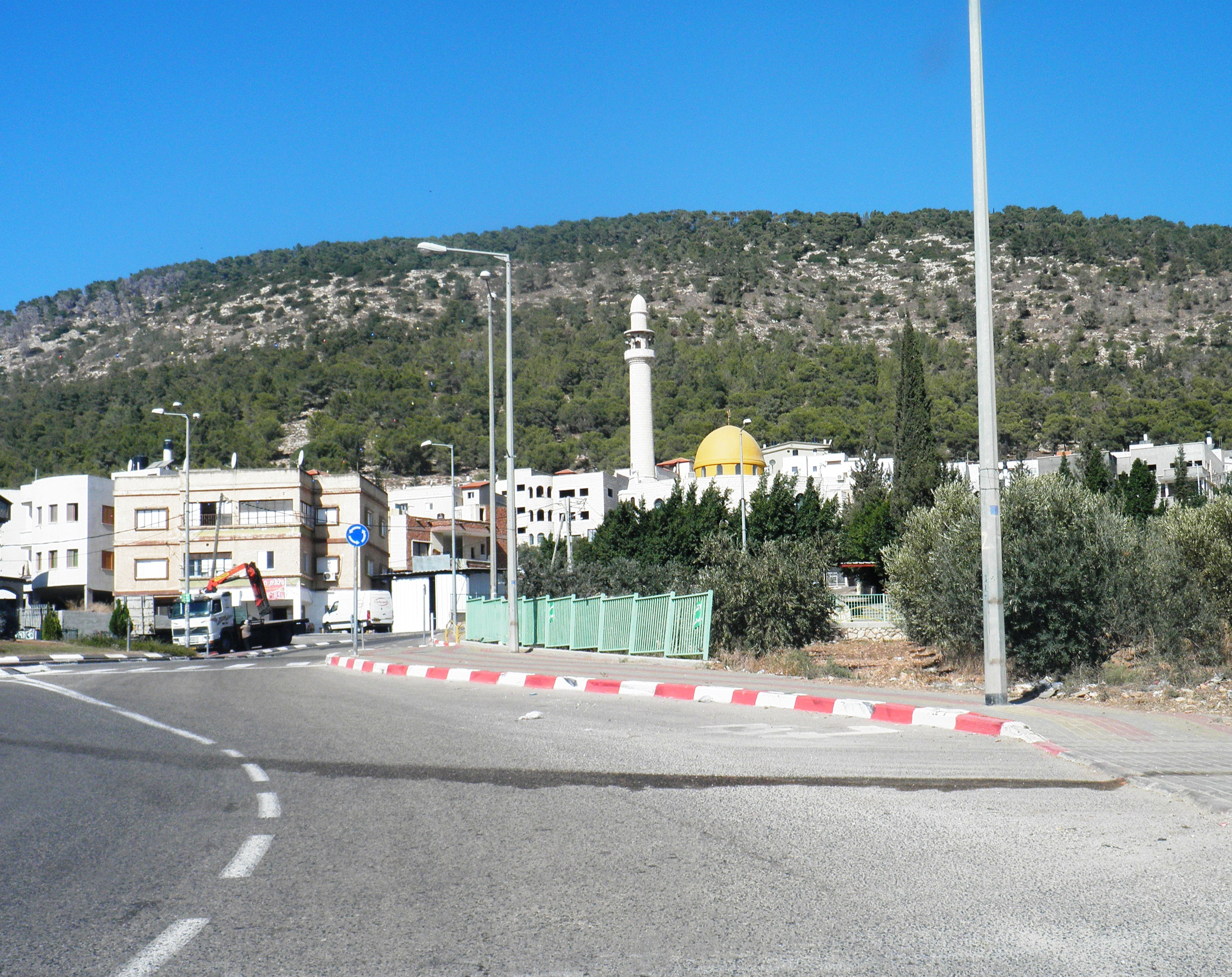 אום אל גאנם